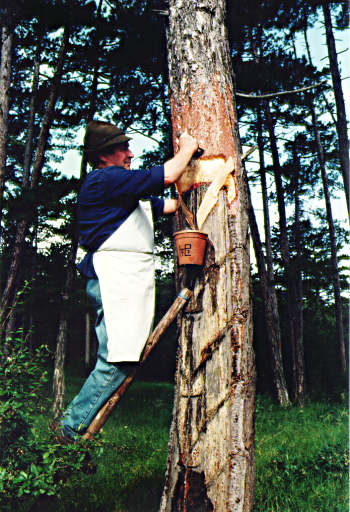 Das Bild zeigt einen Pecher bei der Arbeit, stehend auf einer Leiter beim Plätzen eines Pechbaumes. Weiters ist ein Pechhäferl zu erkennen, das vom Pecher gehaltene Werkzeug ist ein Plätzdexel